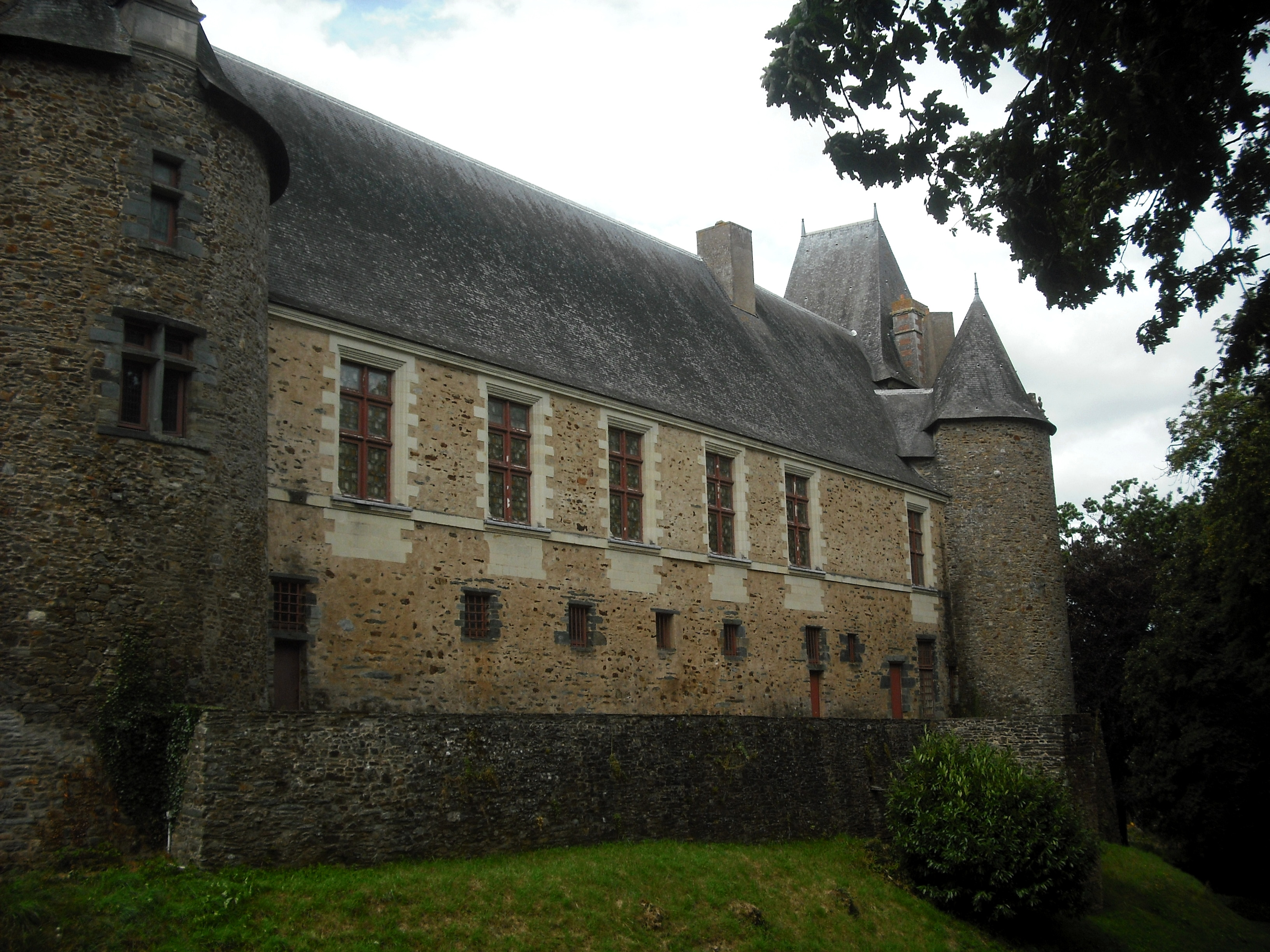 Le Bâtiment des Gardes vu des douves, Château de Châteaubriant, France.